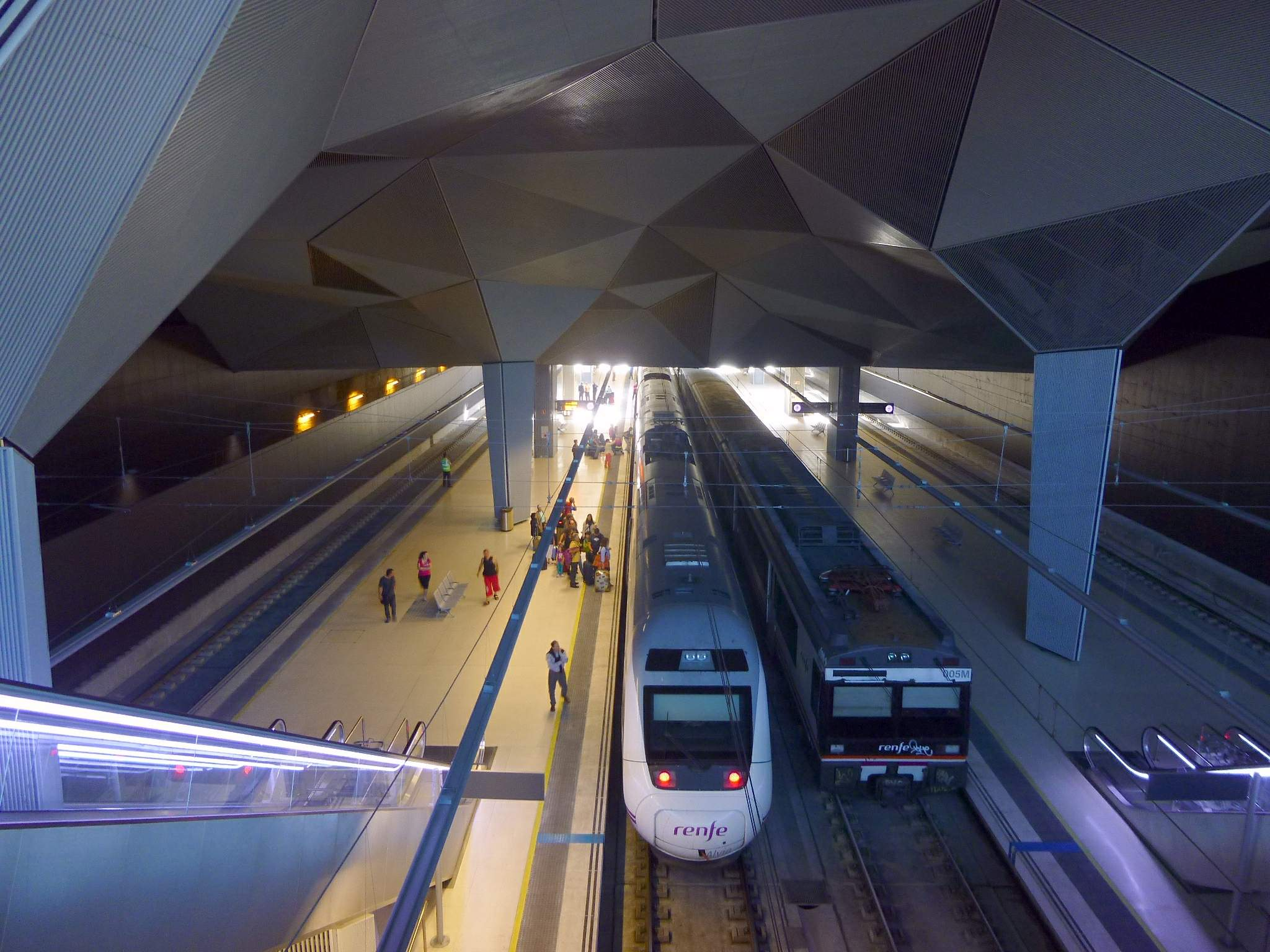 Nueva Estacion de Adif, Logroño